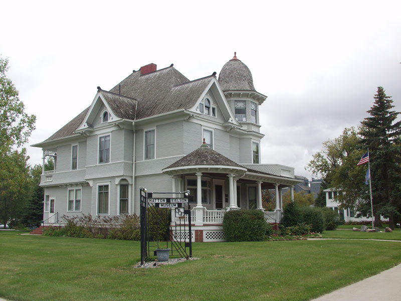 Hatton, North Dakota. From .